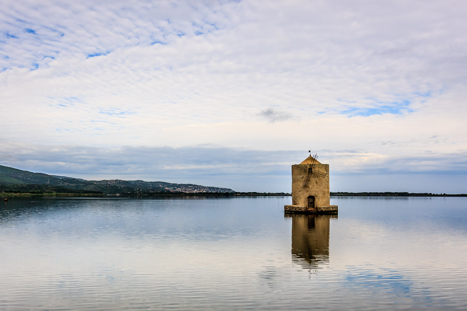 Mulino spagnolo, unico superstite dei nove mulini senesi, costruiti nella laguna nel corso del XV secolo: ristrutturato e consolidato dagli spagnoli – da qui il nome – si presenta a forma circolare con copertura conica ed elica a vento posteriore.